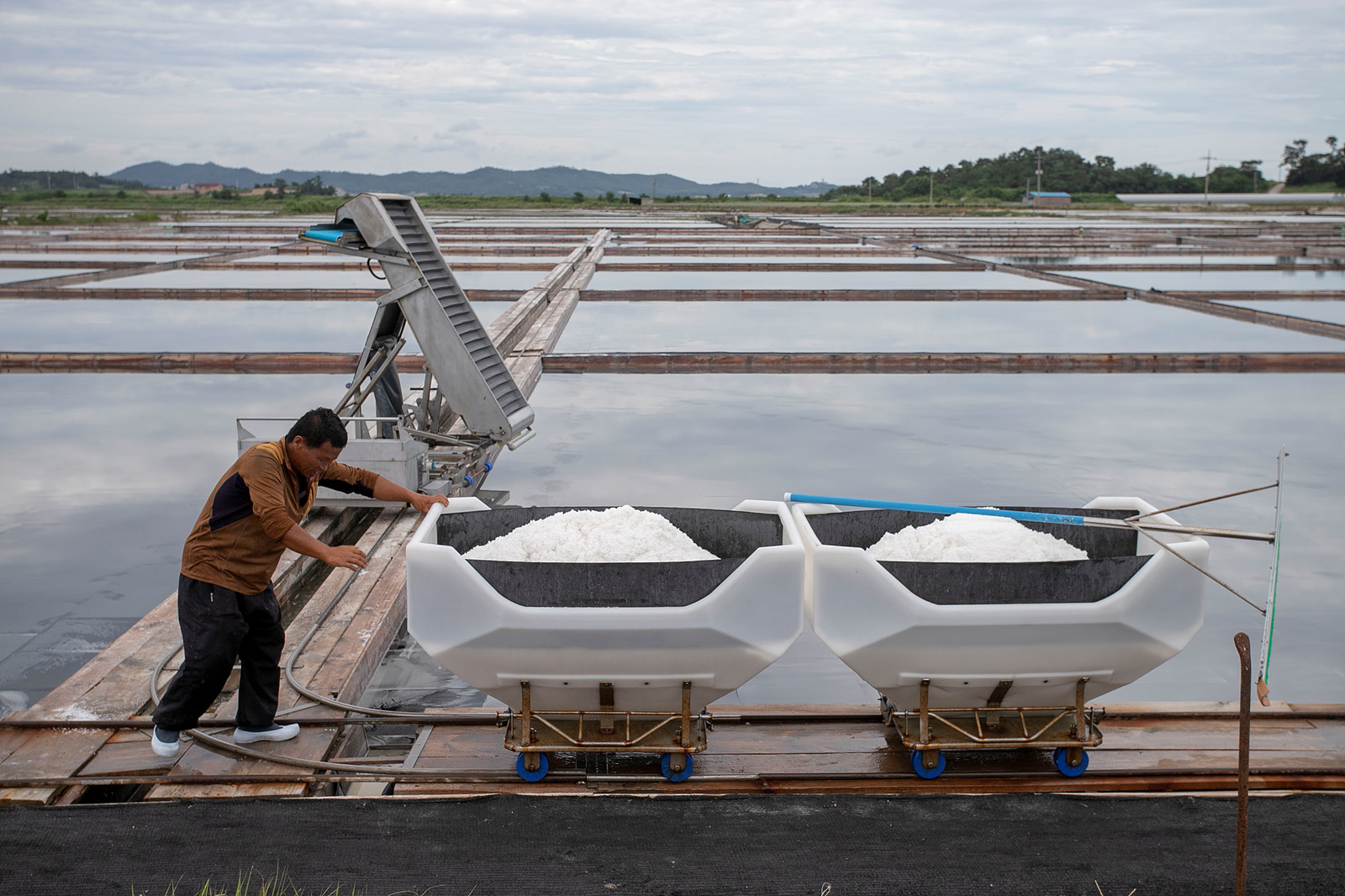 세광염전이며 한국의 천일염과 토판염을 생산하는 곳이며 2019년 전남 해남군 문내면 예락리 방문중 촬영